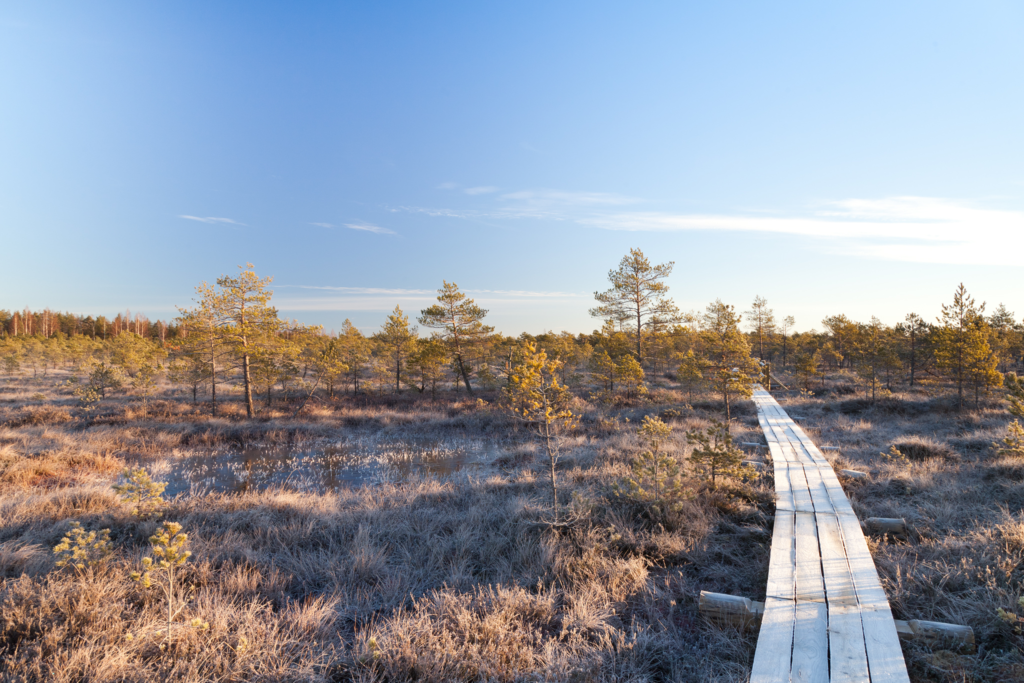 Teiču dabas rezervāts